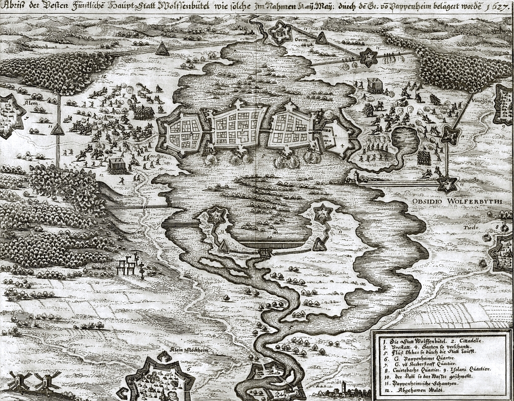 „Abriß der Vesten Fürstlichen Haupt Statt Wolffenbütel wie solche im Nahmen Kay[serlicher] May[estät] durch den Gr[afen] von Pappenheim belägert worden 1627.“ Belagerung der Stadt Wolfenbüttel im Jahre 1627. Im Vordergrund der Schwedendamm.